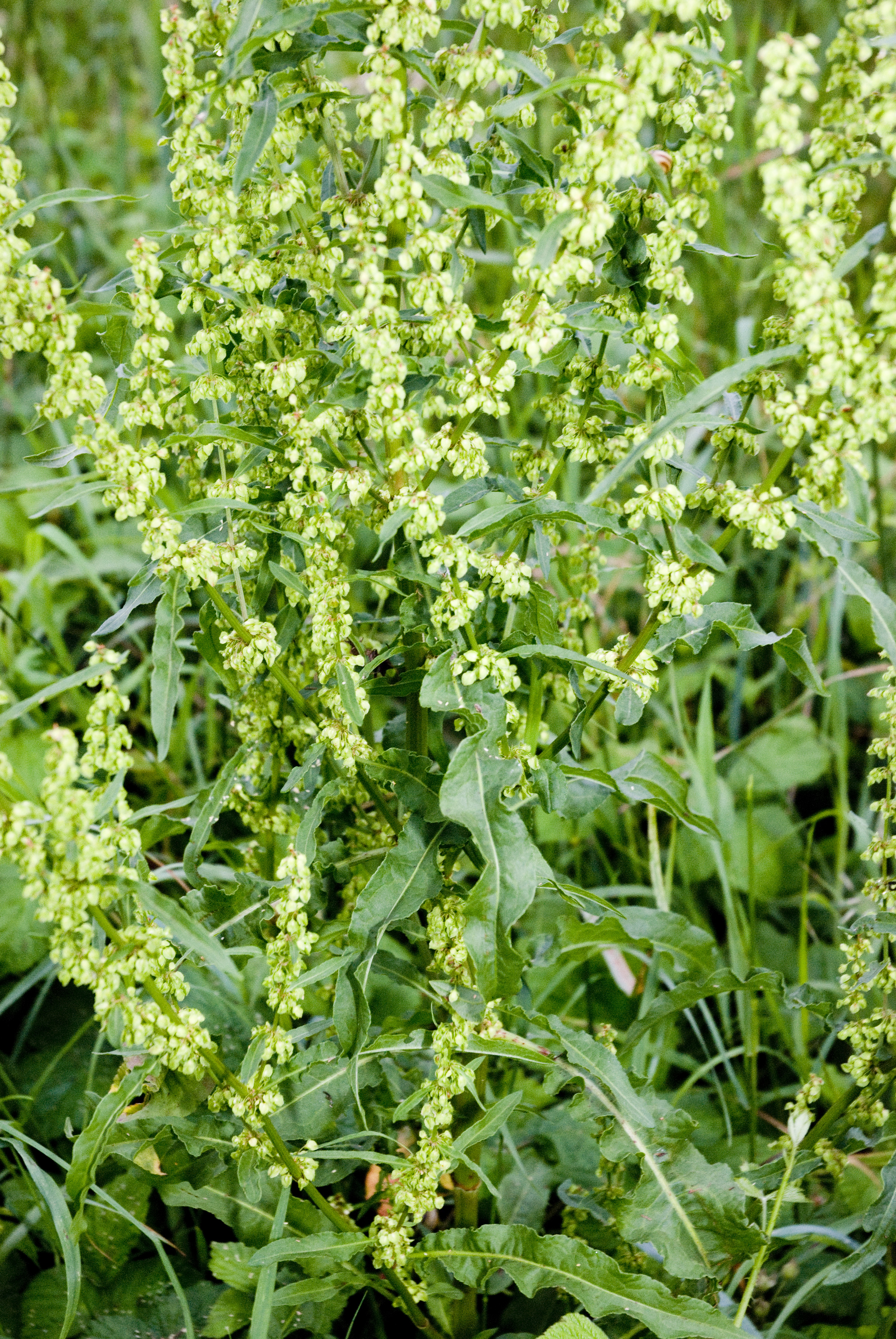 Rumex crispus Vallée de Grâce à Amiens (Somme), France